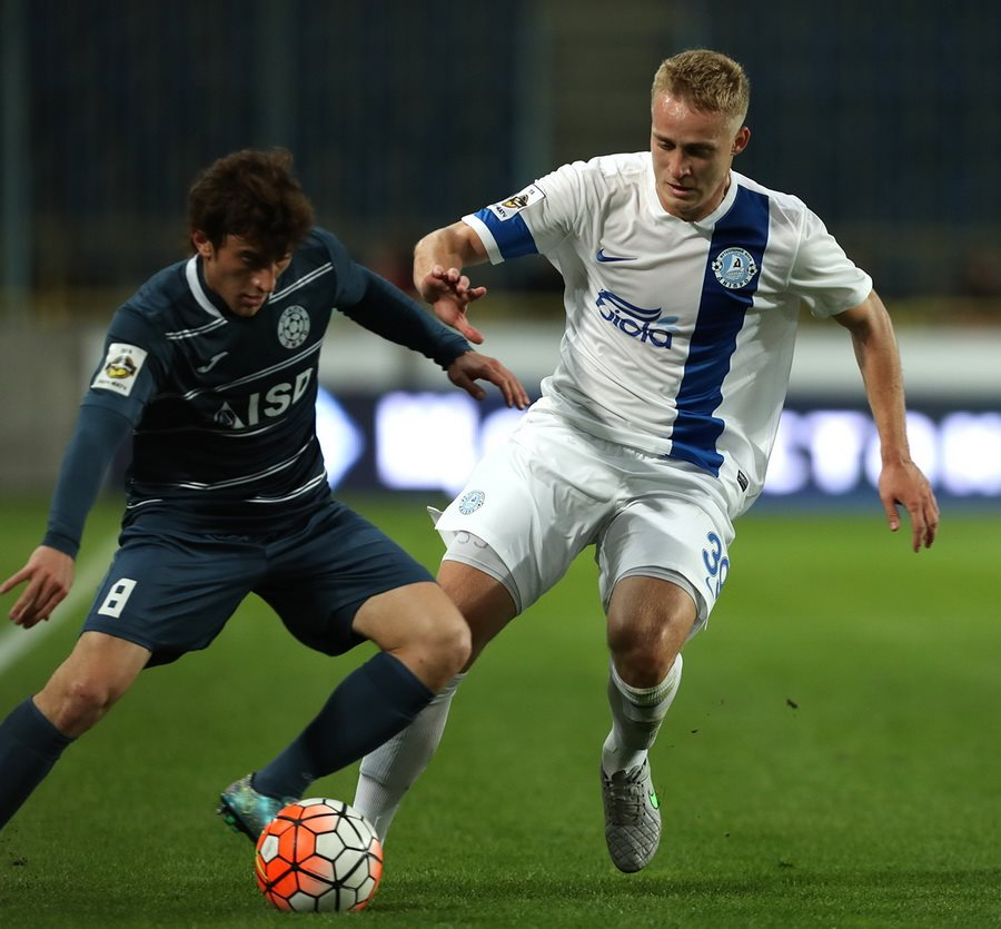 Александр Сваток во время матча Днепр — Сталь